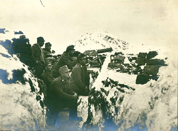 Снимка на австро-унгарско картечно гнездо на Гамскофел в Алпите през Първата световна война.